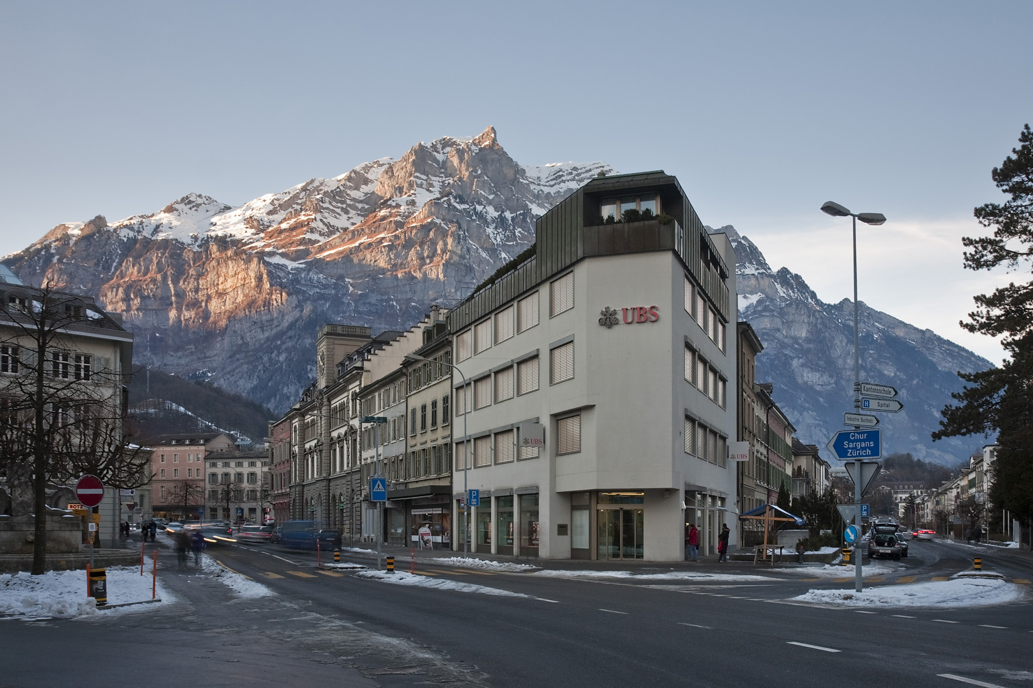 Bürogebäude von Jakob Zweifel in Glarus